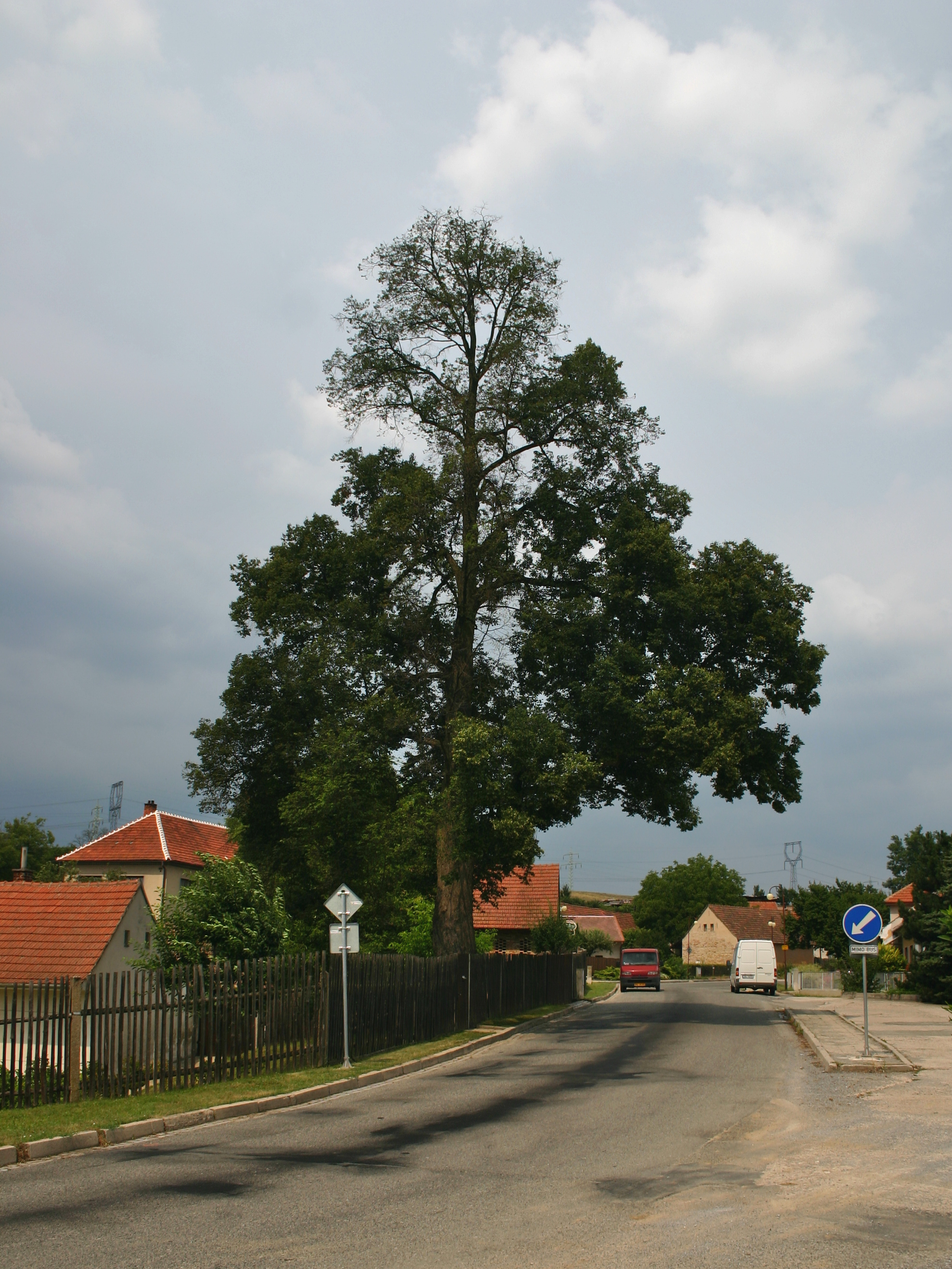 Chudčická lípa po poškození rtutí, 14. červenec 2006